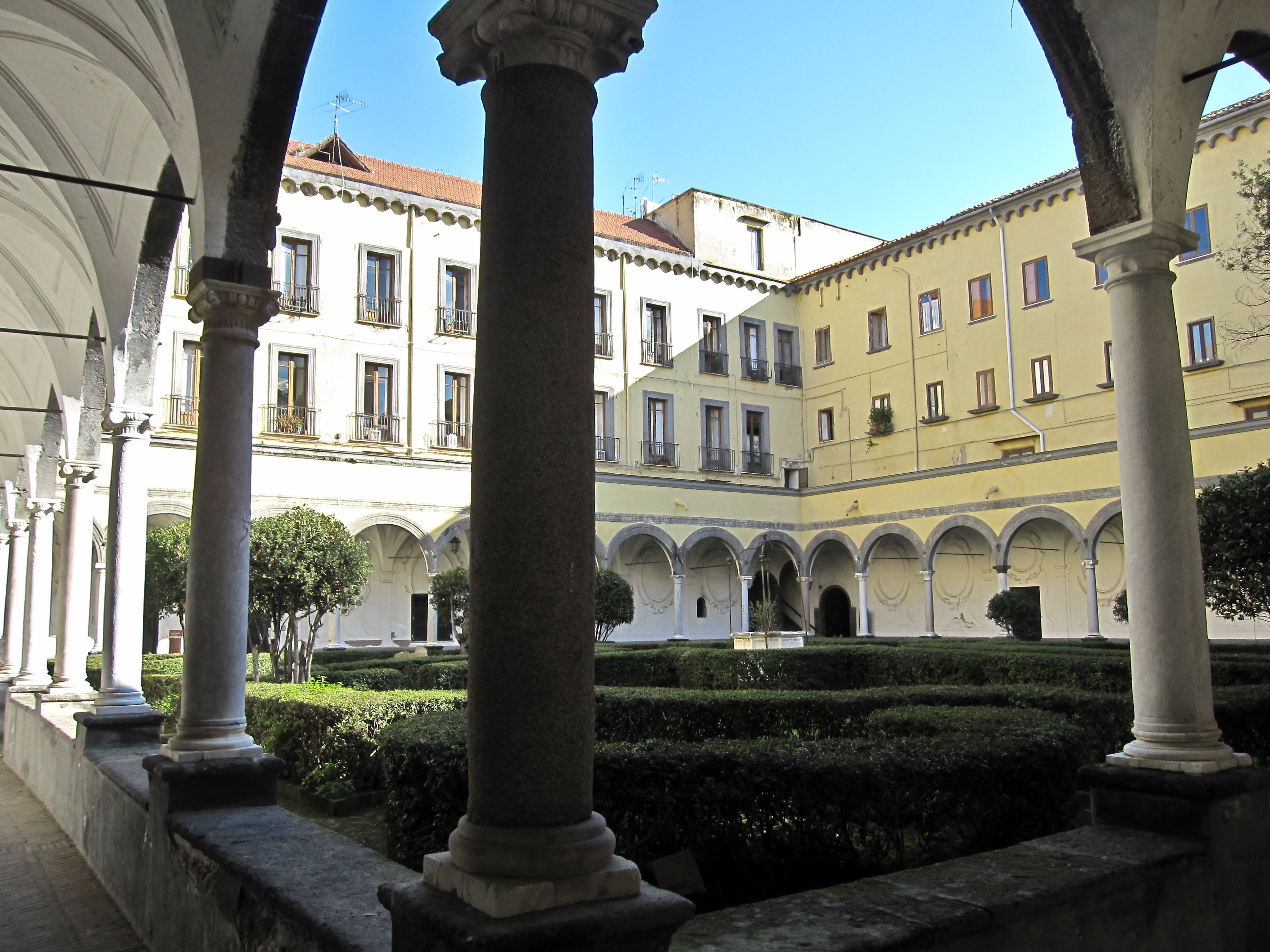 Chiostro maggiore della chiesa di Santa Maria la Nova (Napoli)